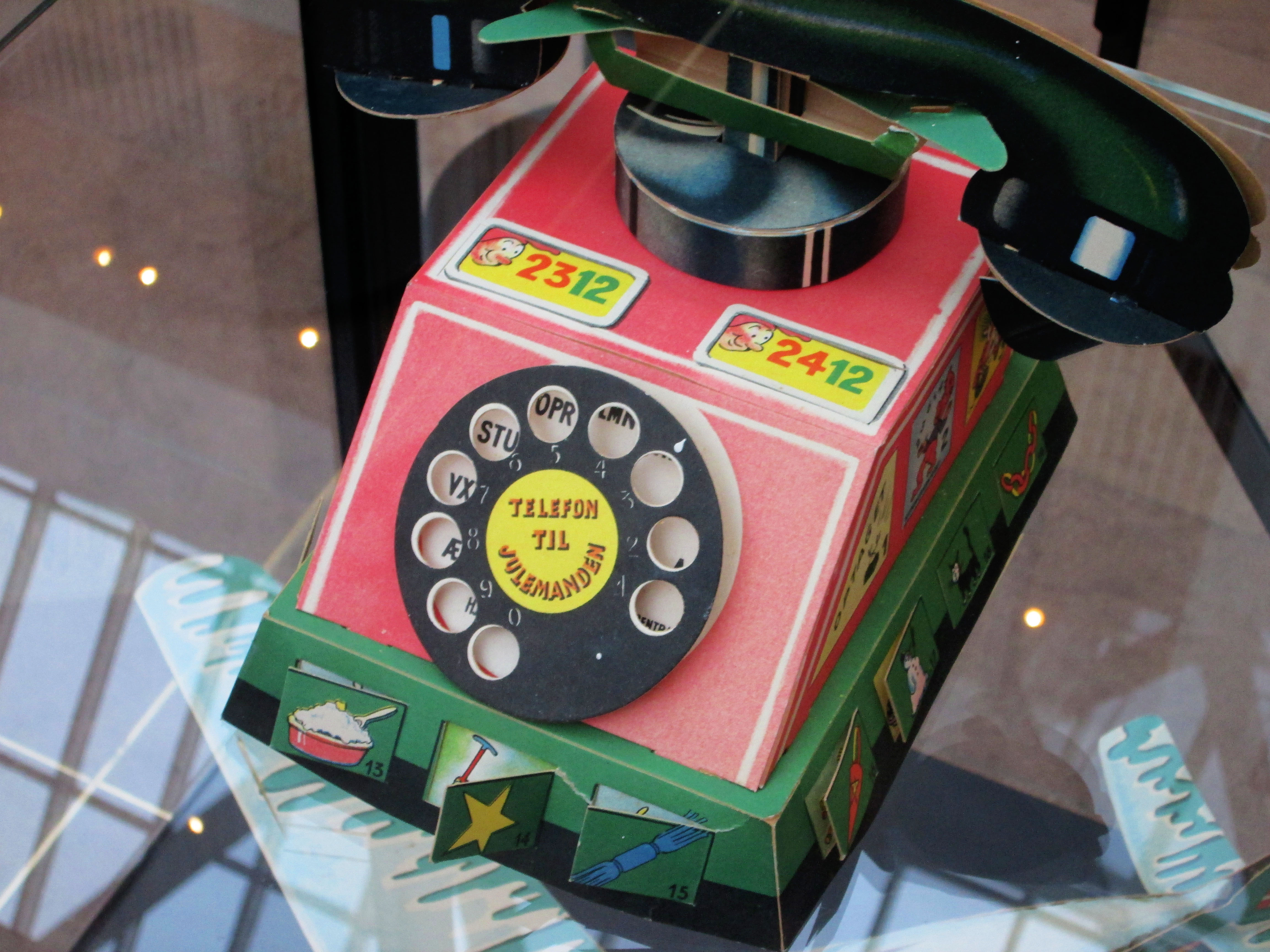 Billeder fra Nationalmuseets mini-udstilling om historisk julepynt, som kan ses i museets forhal indtil d. 6. januar 2014. Udstillingen viser blandt andet en række flotte tredimensionelle julekalendere.